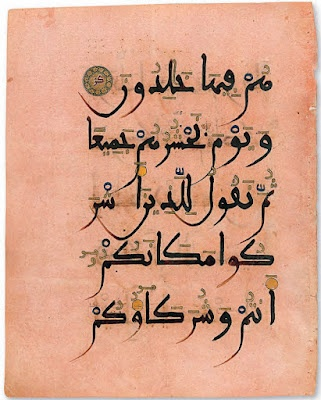 andalus.cal.12